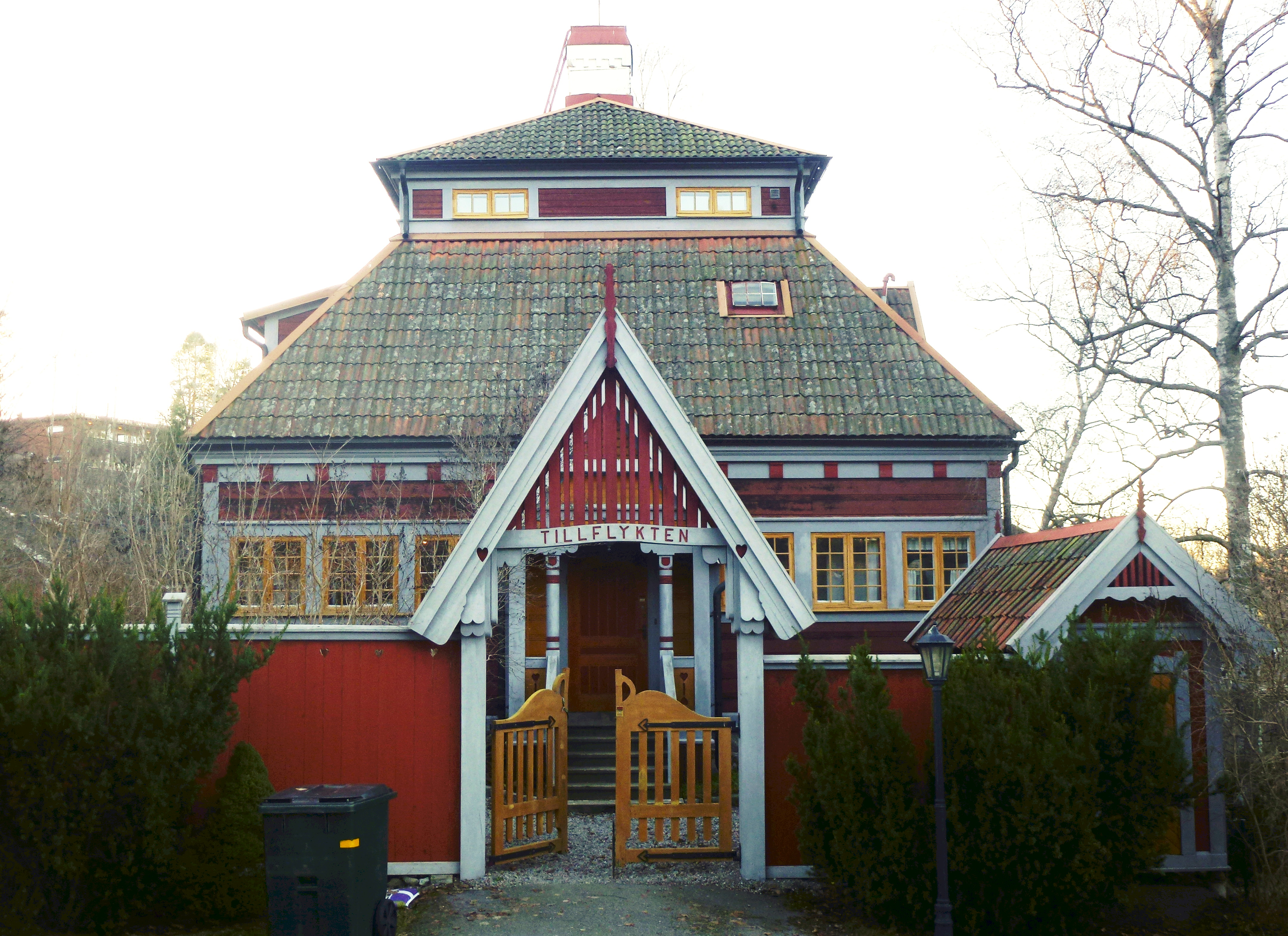 Villa Tilllflykten, Storängens strandväg 1, arkitekt Arvid Bjerke